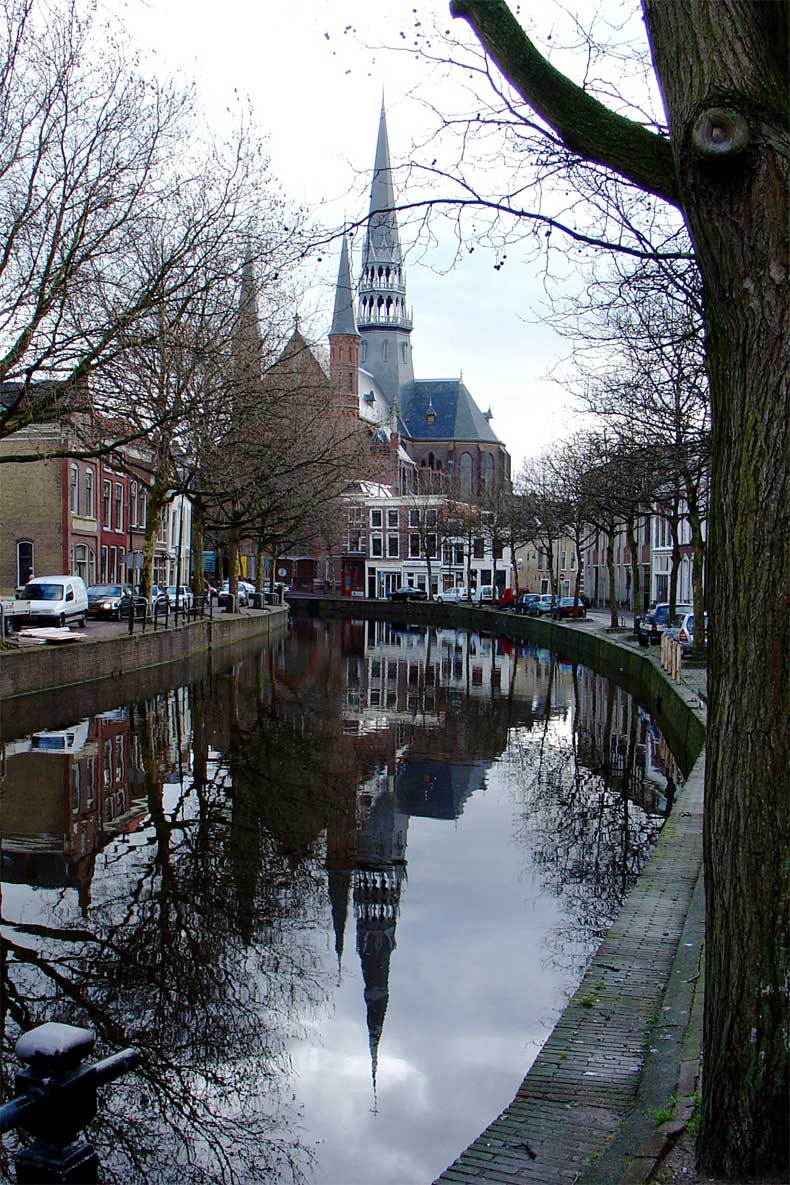 Gouwekerk te Gouda (Gouwechurch at Gouda)